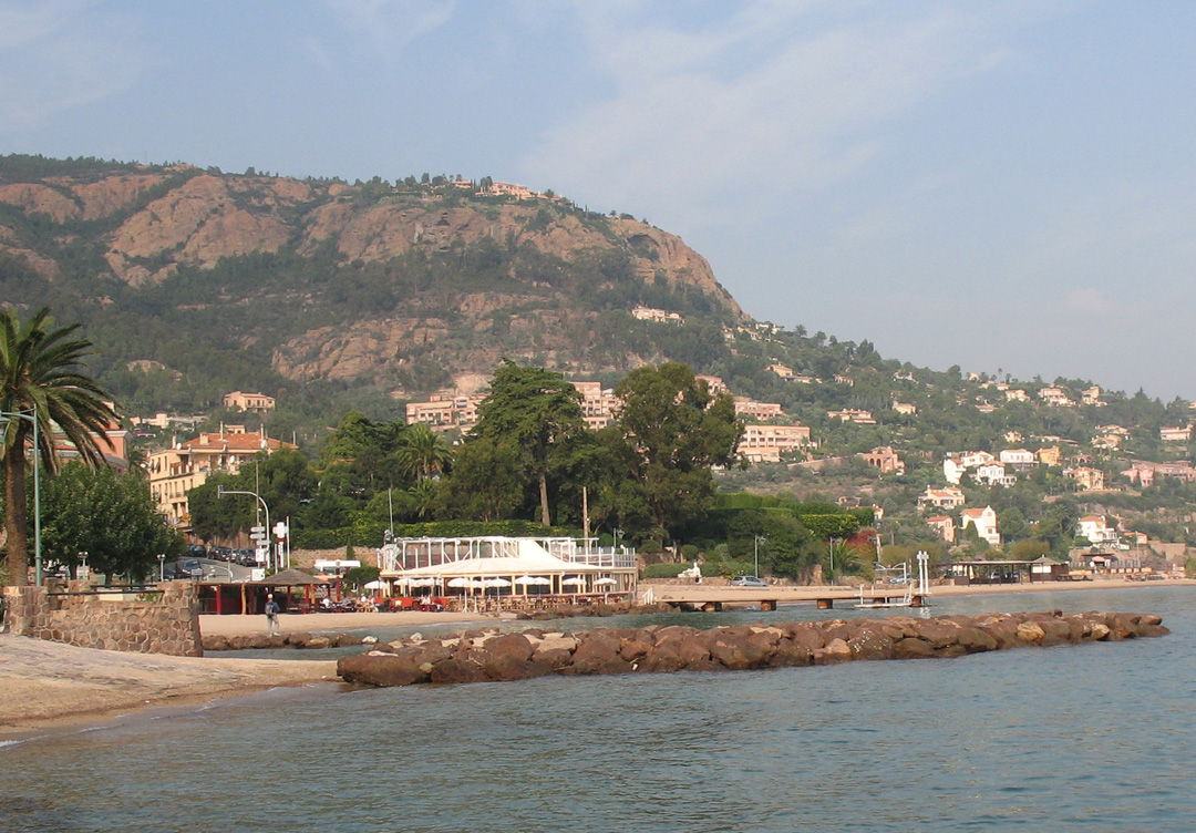 Plage de Théoule-sur-Mer, France